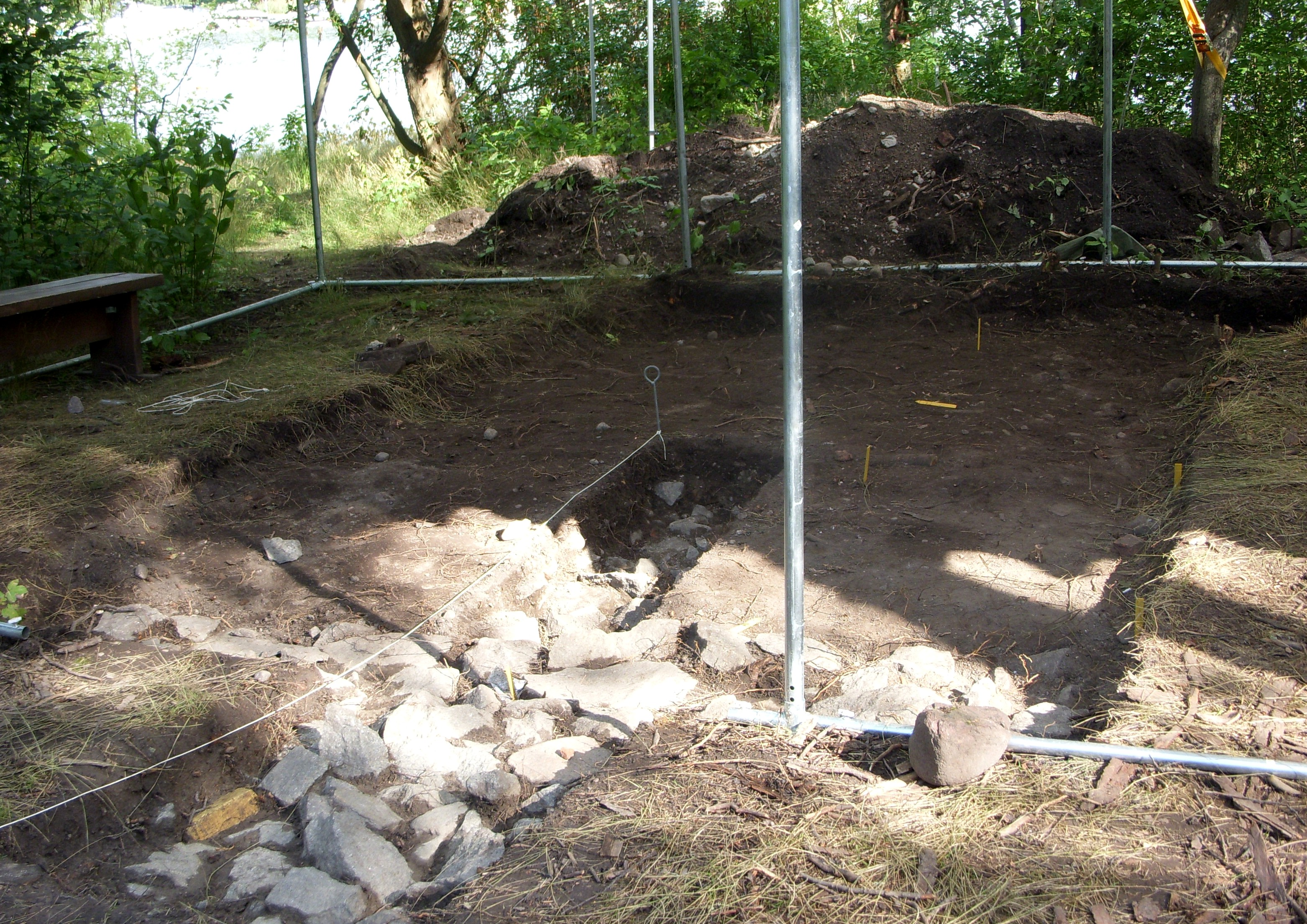 Utgrävningar vid platsen för Stockholmsutställningen 1897, modell i skala 1:2 av "Helgeandsholmen"